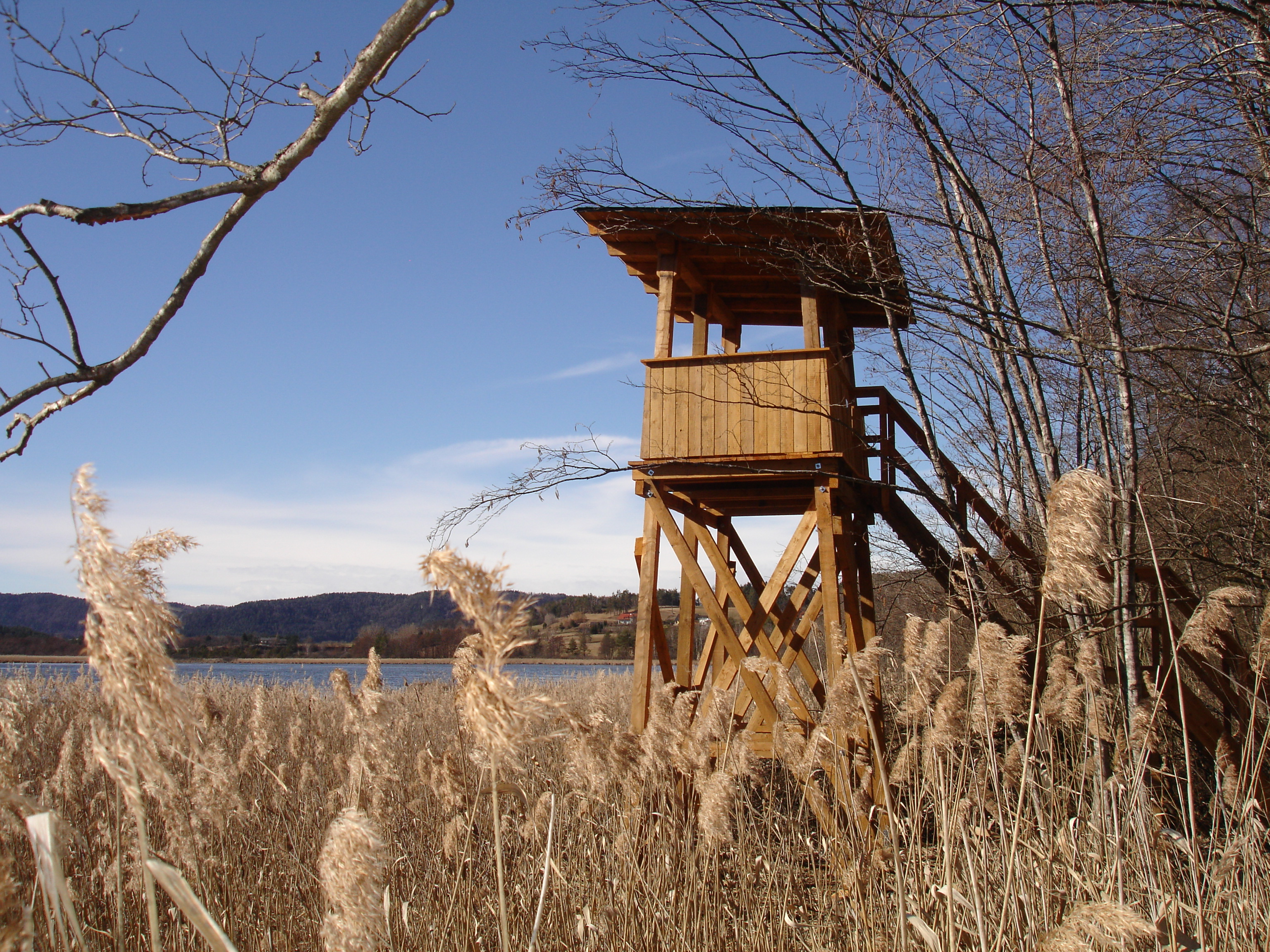 Der Aussichtsturm gewährt einen großartigen Blick über die Moorlandschaft des Sablatnigmoors